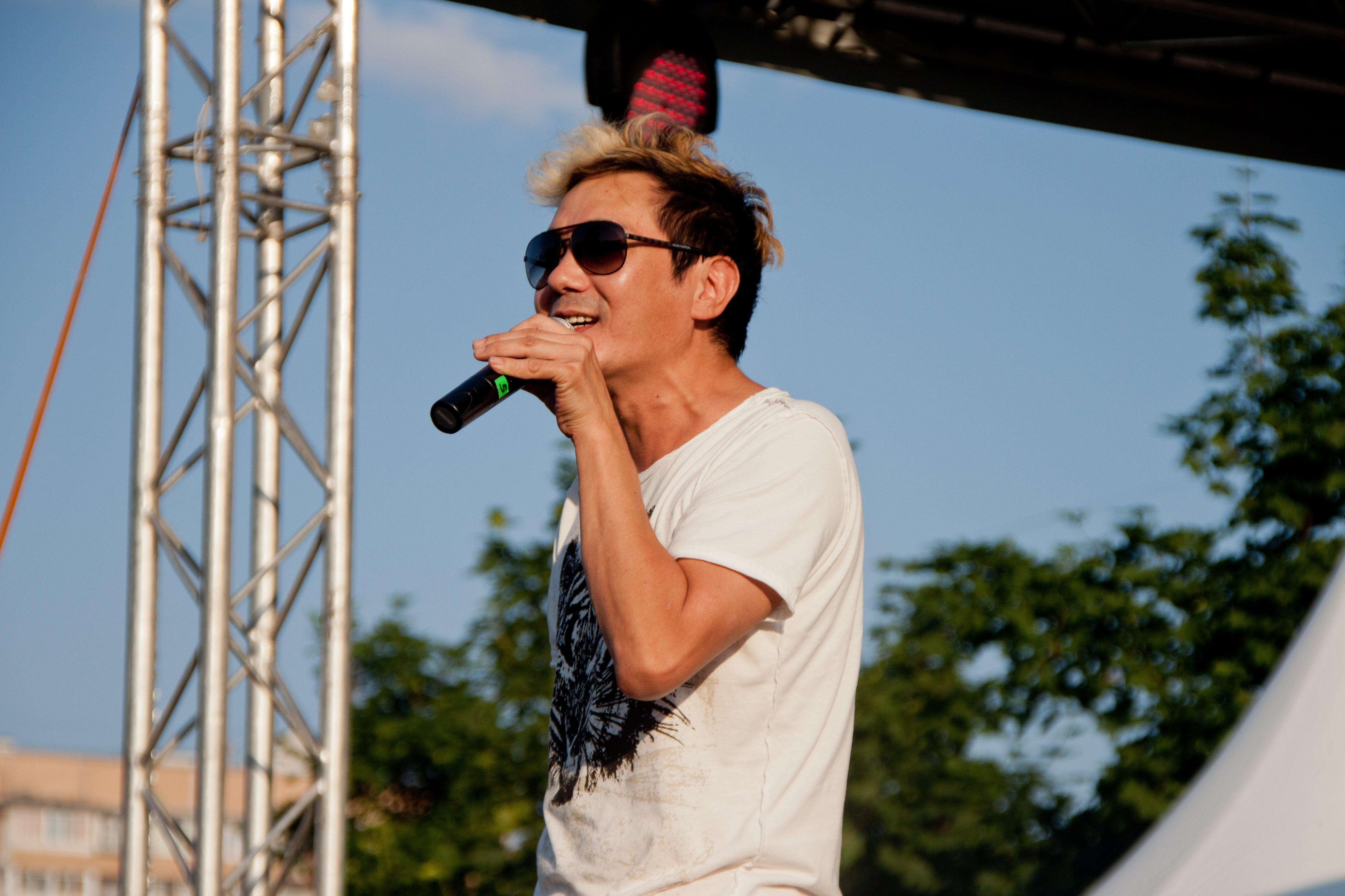 Экс-солист группы "Иванушки International" Олег Яковлев на празднике "Лучший город Земли" в р-не Гольяново (Москва)